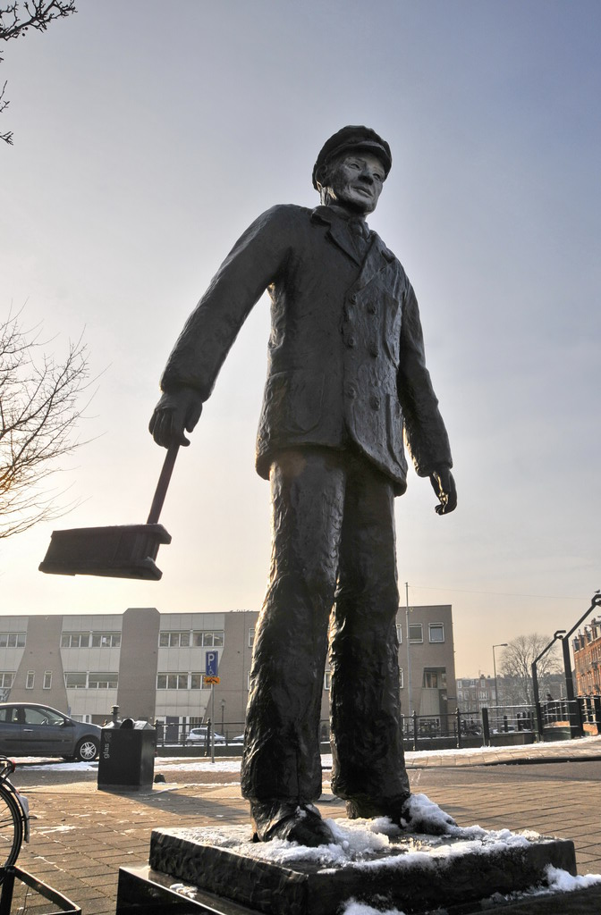 'Ode aan de vuilinisman' (In Honor of The Binman). 130 jaar reiniging (130 Years Sanitation Service1877-2007). Beeldhouwer (sculptor) Rob Cerneüs (Amsterdam 1943).